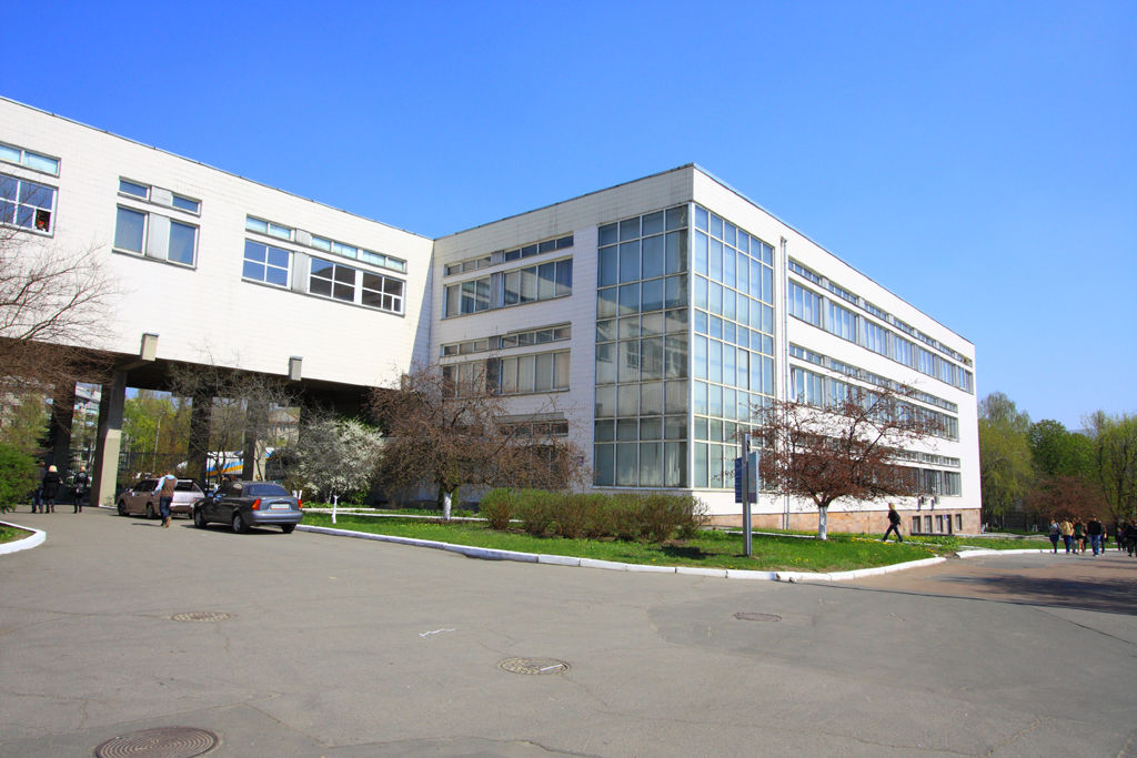 Главный корпус Научно-технической библиотеки Национального авиационного университета